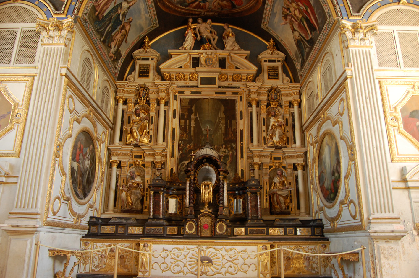 Retable baroque de la chapelle des jésuites de Poitiers, au collège Henri IV. Tableau (la Circoncision du Christ) de Louis Finson, statues de Gervais de la Barre (4 Évangélistes et Vierge de Pitié).